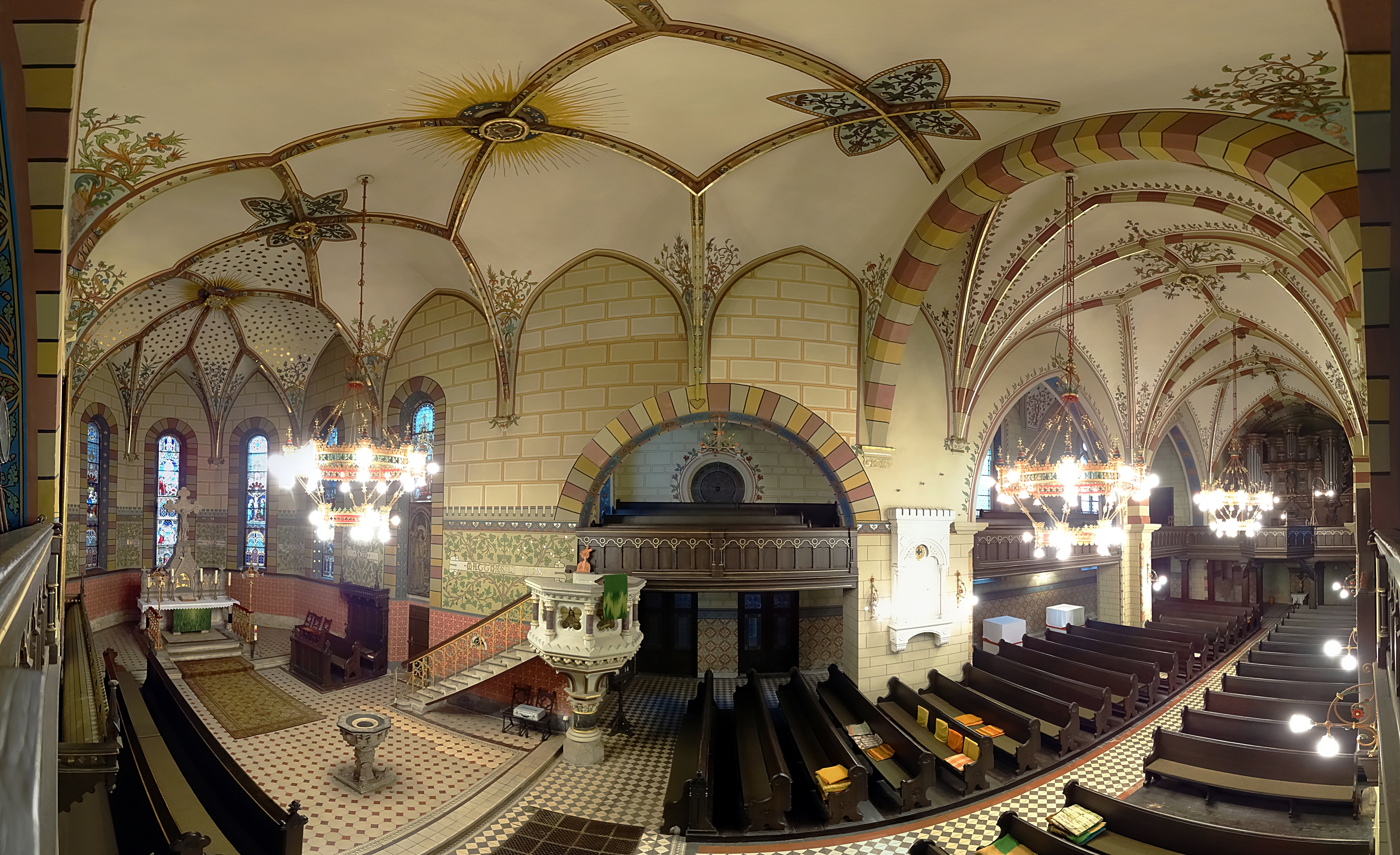 Innenraum Panorama der Stadtkirche St. Jacobi, Wanzleben